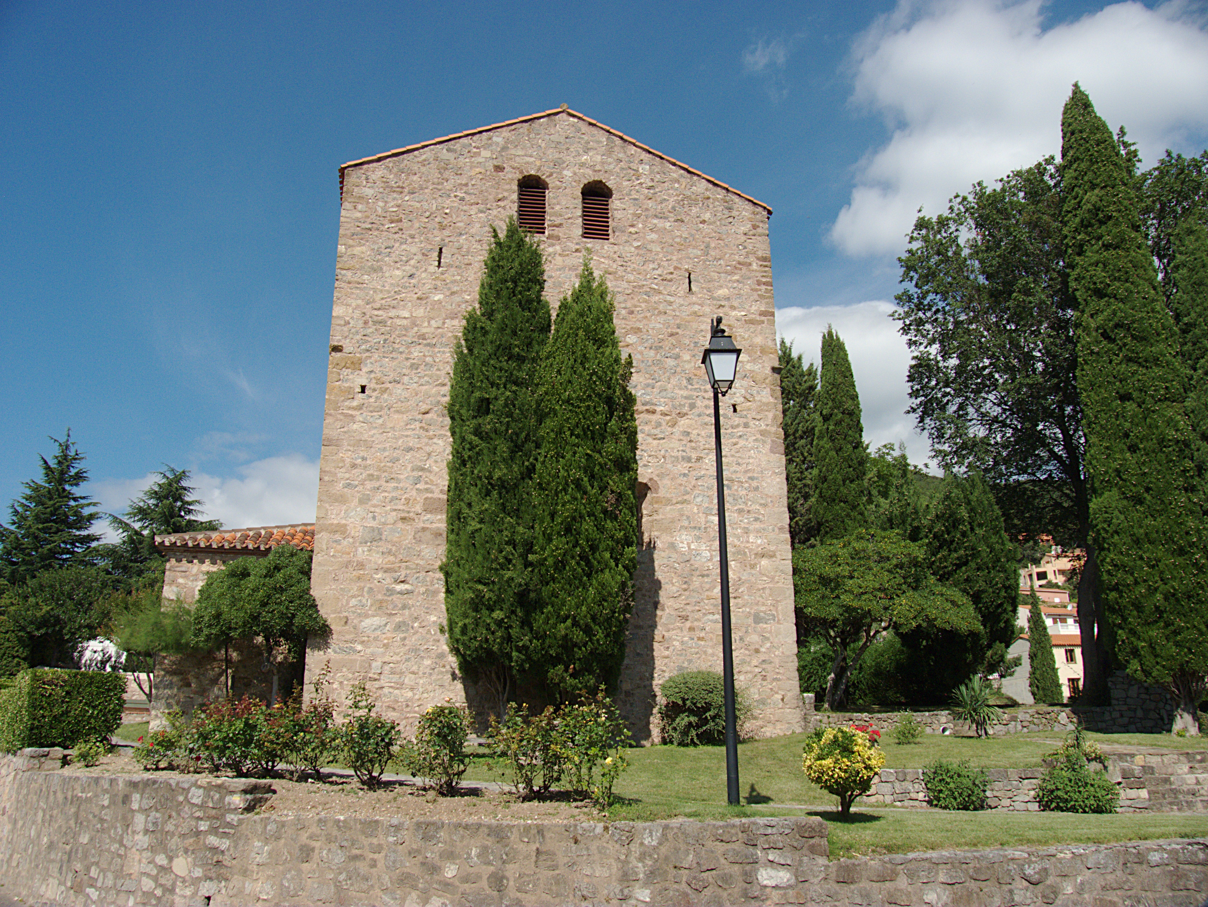 Église Saint-André (XIIème siècle), Montbolo (Pyrénées-Orientales, Languedoc-Roussillon, France)